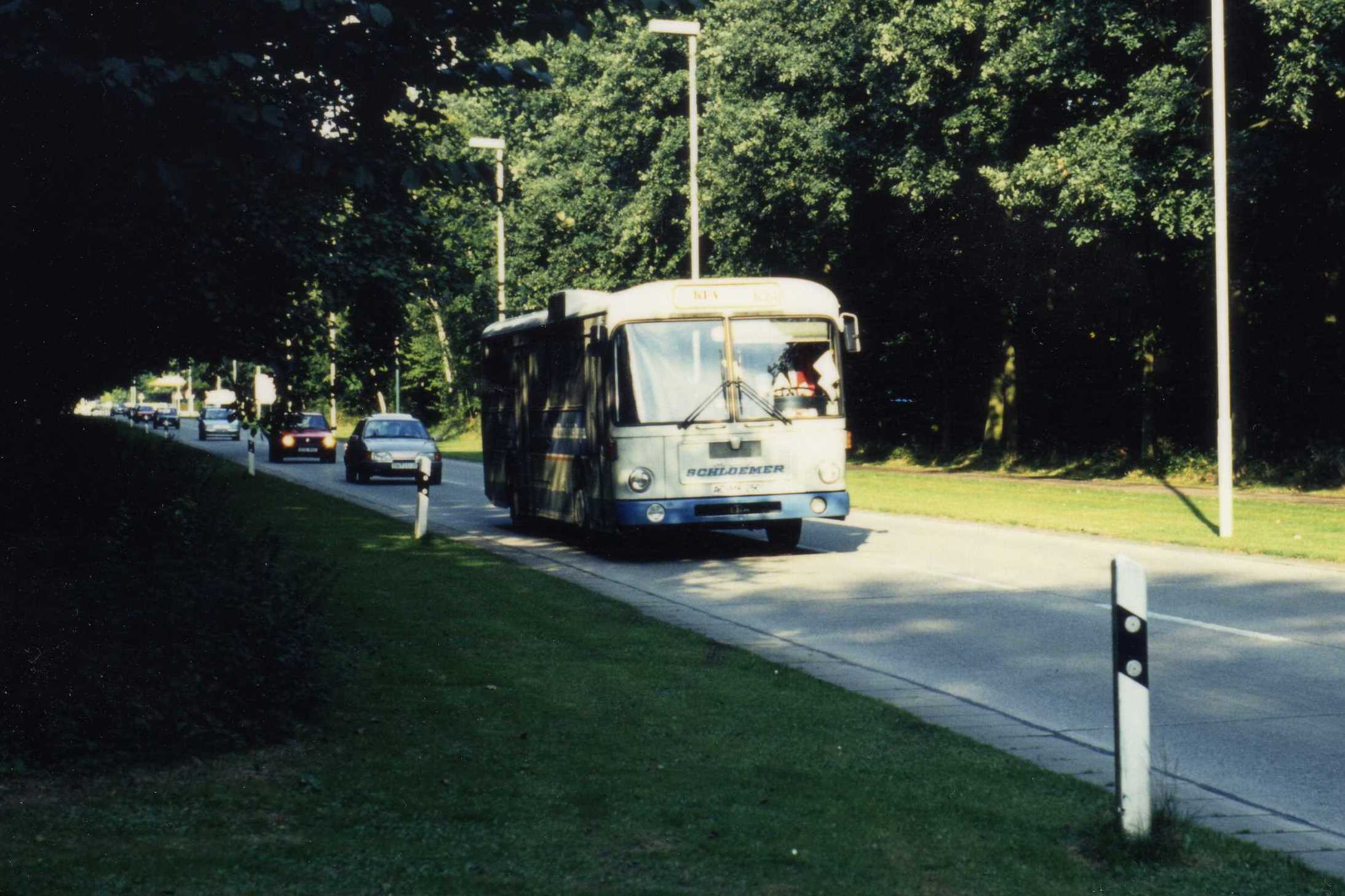 Die KFA Jülich (heute Forschungszentrum FZJ) setzte in ihrem Werksverkehr-Netz zumeist Busse von Auftragsunternehmen ein - hier ein Standard-Linienbus der Firma Schloemer bei der Fahrt über die charakteristische Betonstraße.